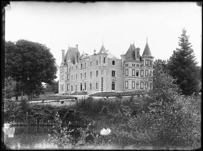 Château de Grésillon. Ensemble sur parc